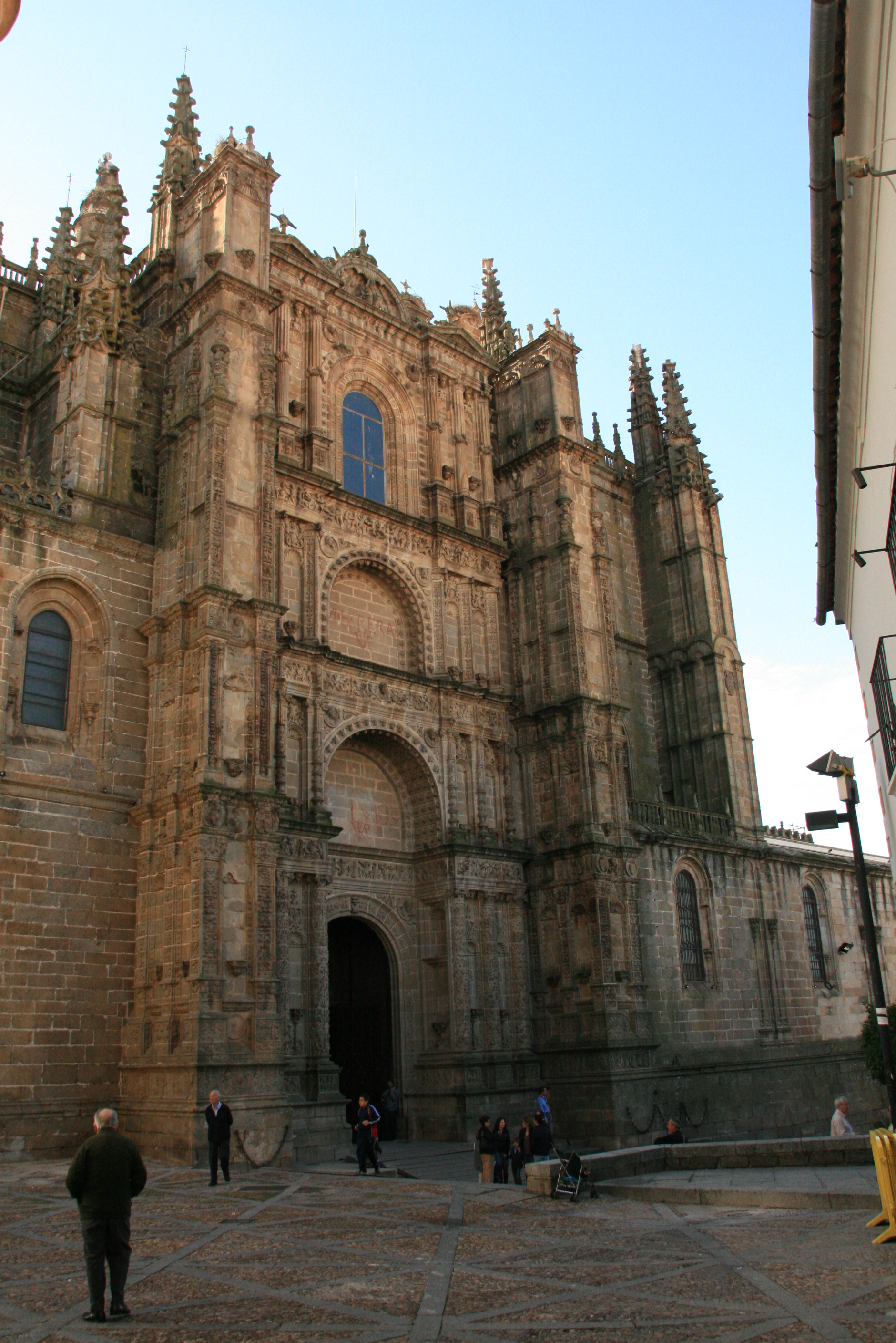 Vista de la catedral nueva de Plasencia